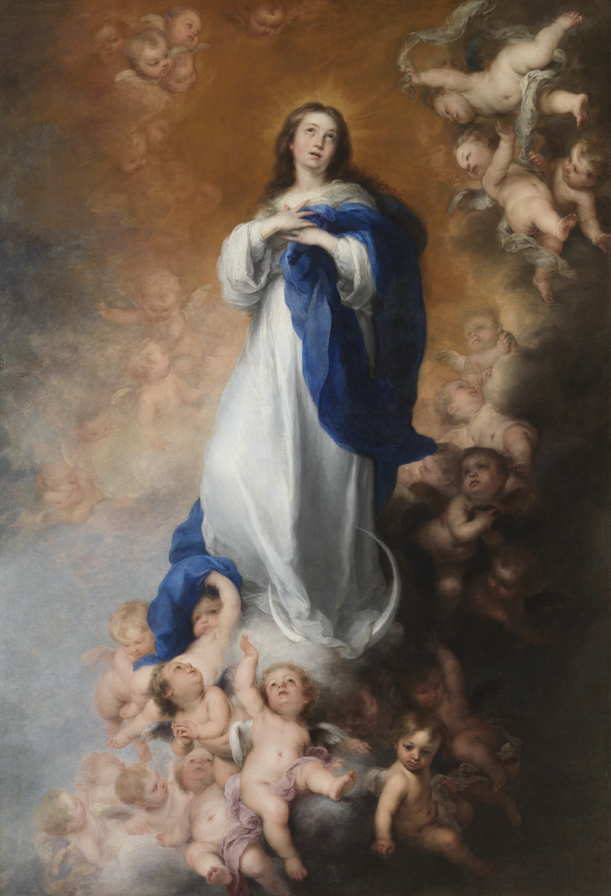 En la mayoría de las Inmaculadas de Bartolomé Esteban Murillo, de las que llegó a pintar unas veinticuatro, la Virgen María aparece vestida con una túnica blanca y un manto de color azul, con sus manos cruzadas sobre el pecho, y al mismo tiempo con una luna creciente a sus pies y con la vista puesta en el Cielo. Esta obra le fue encargada a Murillo por Justino de Neve (1625-1685), que era un canónigo de la catedral de Sevilla, con destino al Hospital de los Venerables de la ciudad de Sevilla, ya que en España se había extendido extraordinariamente desde el siglo XVI la devoción por la Inmaculada Concepción de María, siendo además dicho país el principal defensor del misterio y el que luchó con mayor insistencia hasta que se convirtió en uno de los dogmas de la Fe católica, aunque ello no ocurriría oficialmente hasta el año 1854. A lo largo de su vida, Murillo pintó unas dos docenas de Inmaculadas que en la actualidad se encuentran repartidas por todo el mundo, aunque cuatro de ellas se conservan en el Museo del Prado y otras tantas en el Museo de Bellas Artes de Sevilla, la ciudad natal del pintor.